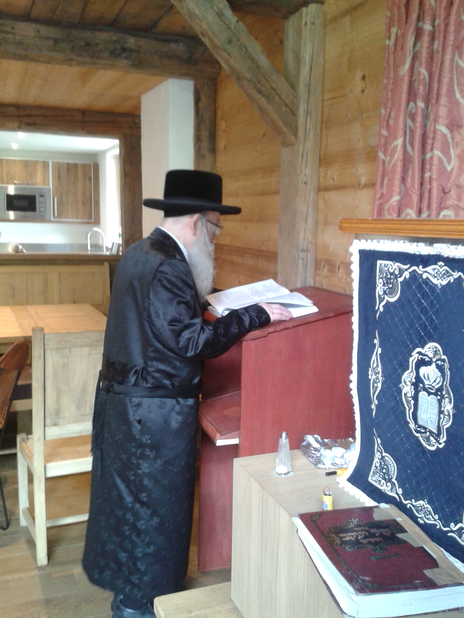 האדמו"ר מפשווערסק